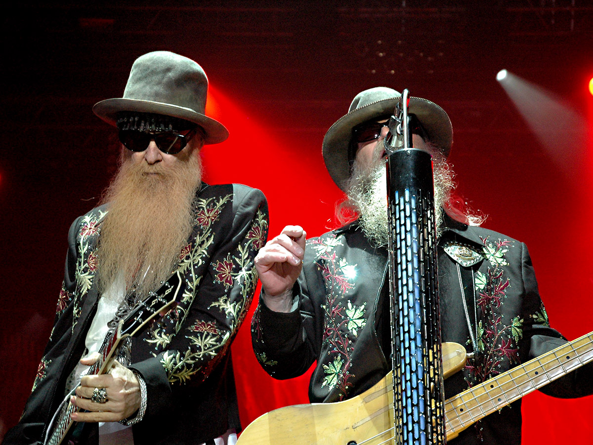 Le groupe ZZ Top a fait un carton au festival de Beauregard en 2011